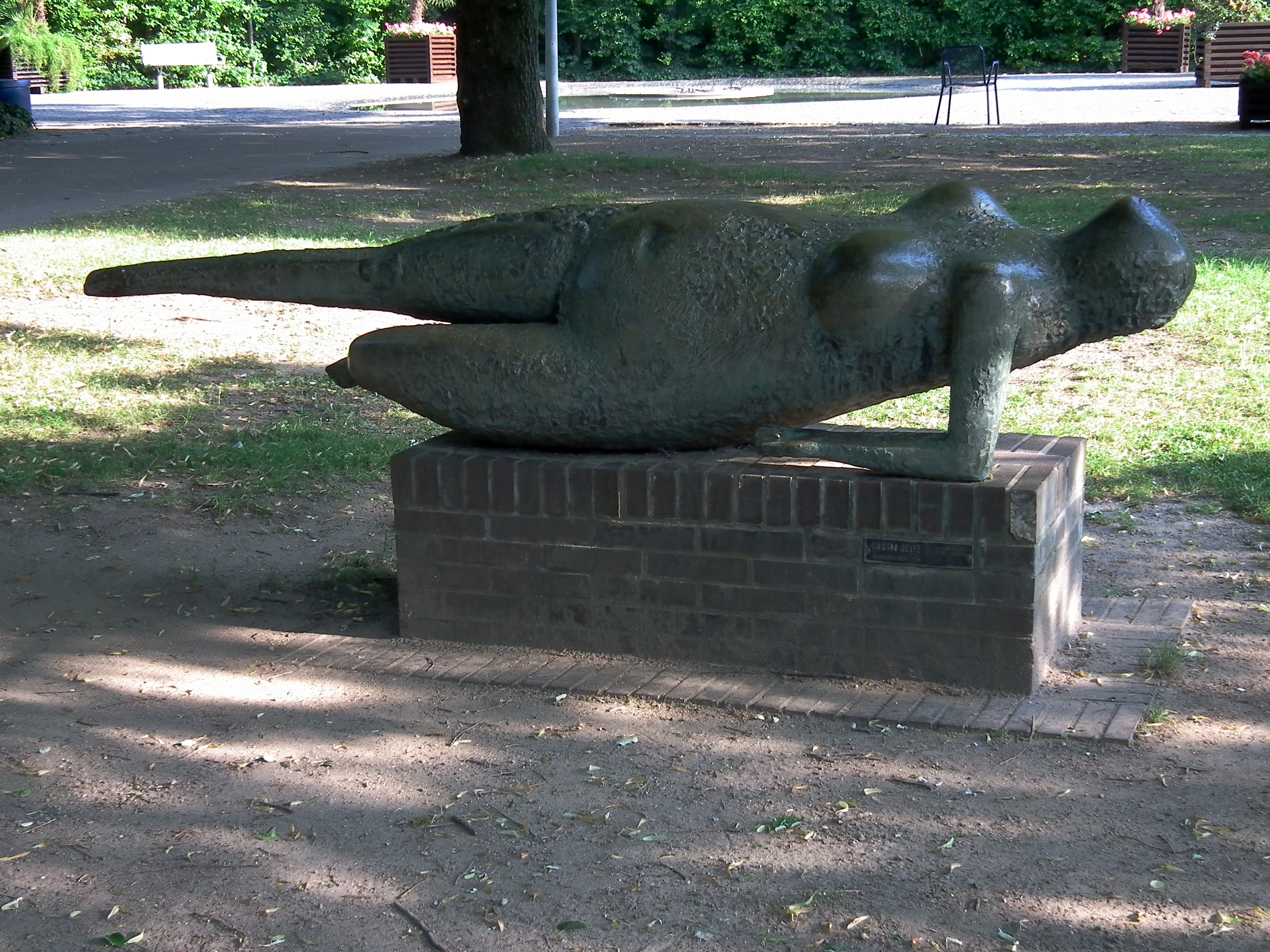 "Flensburger Venus" (1963) von Gustav Seitz, fotografiert im Herzogenriedpark Mannheim (Baden-Württemberg, Deutschland)